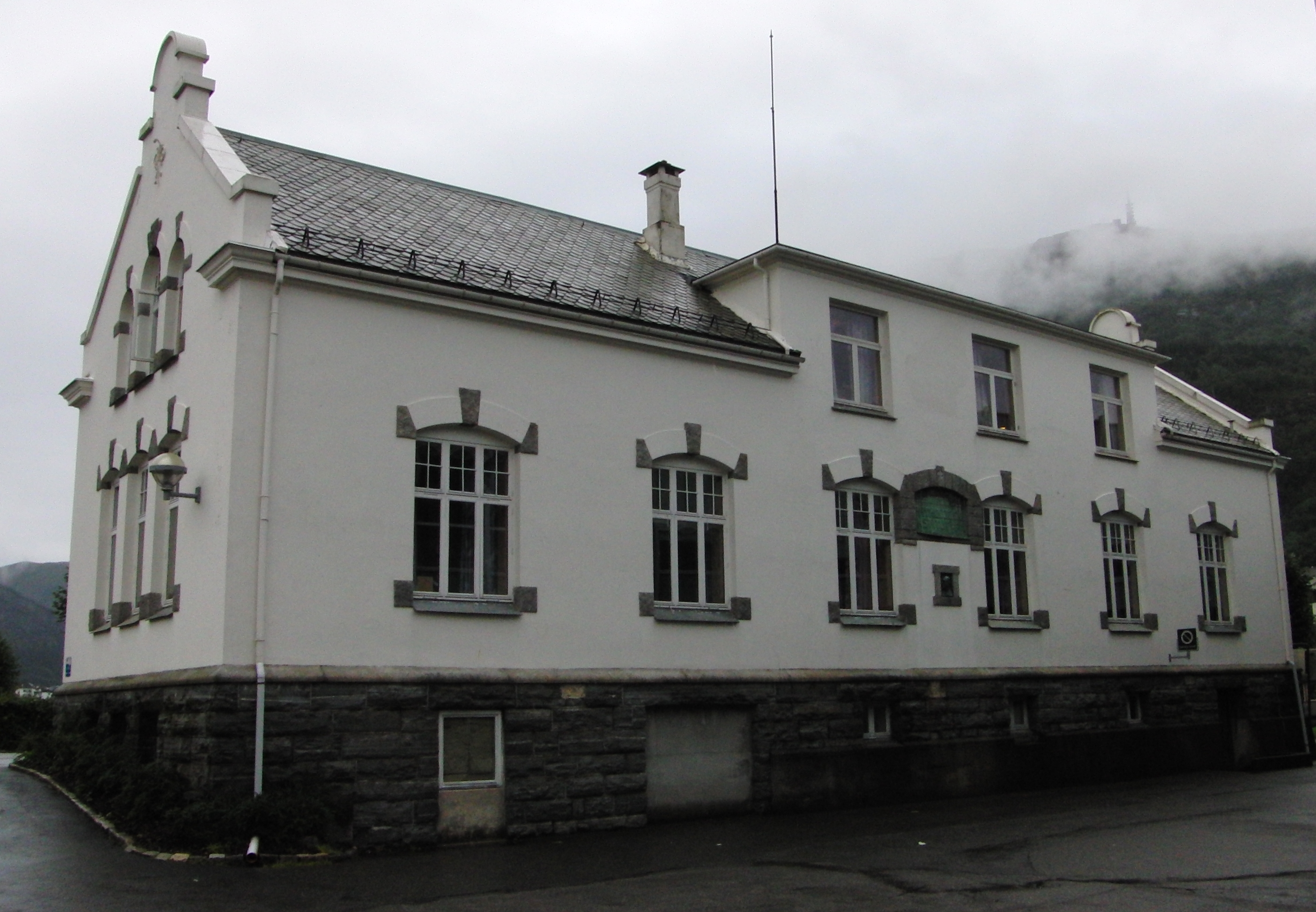 Description=Haukeland Universitetssykehus